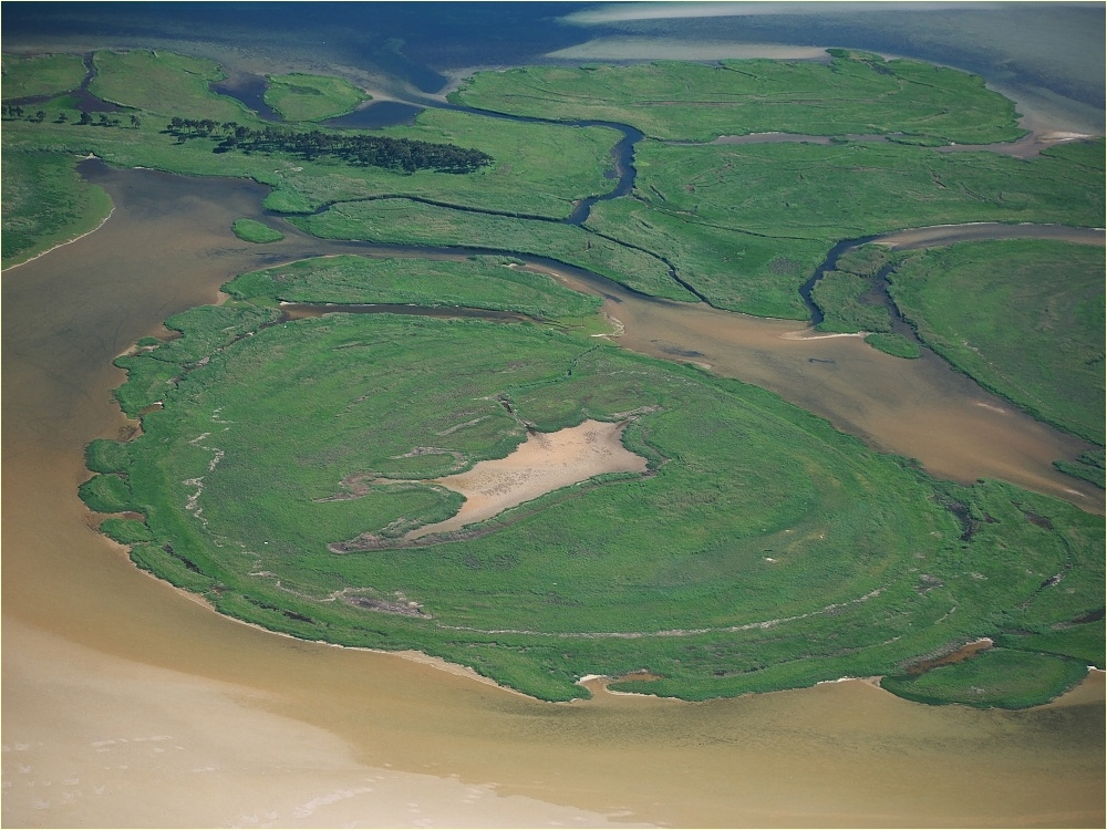 Inselgruppe Kleine Werder im Nationalpark Vorpommersche Boddenlandschaft